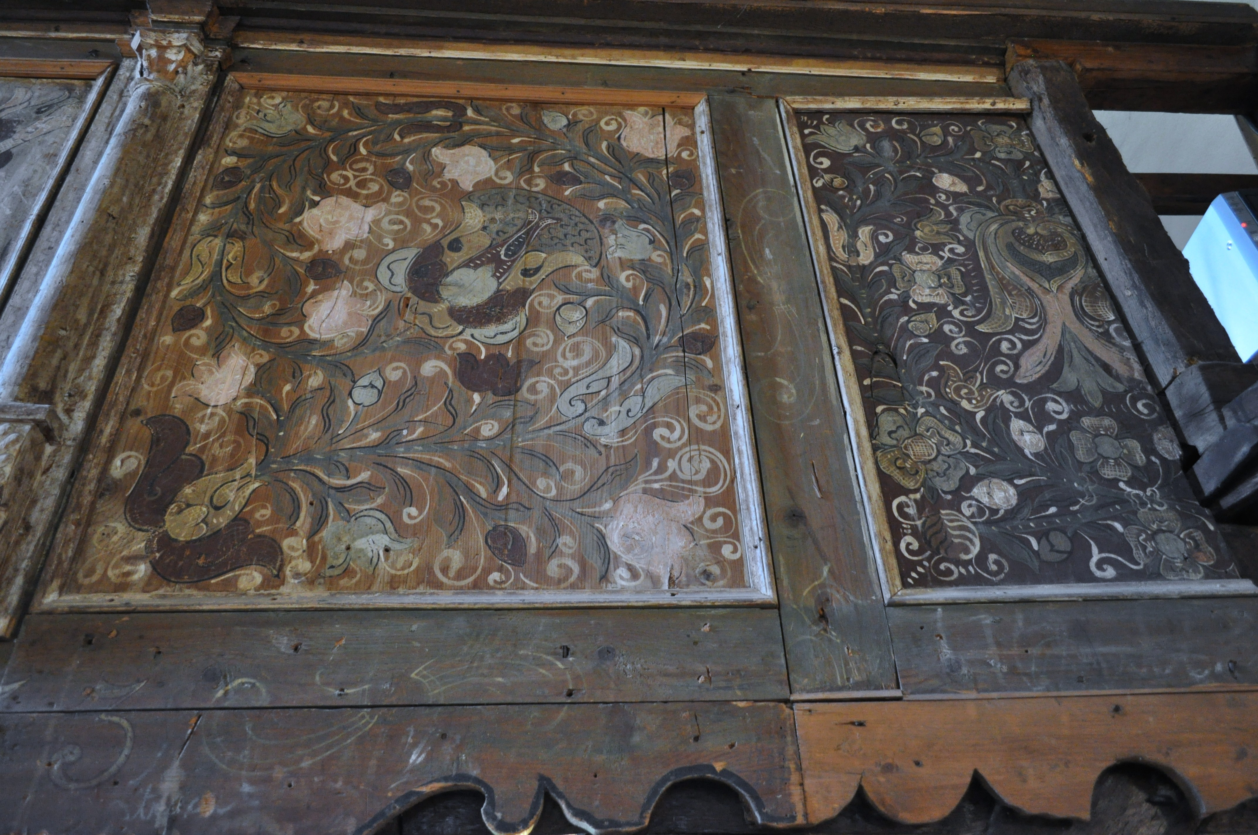 Cetatea Câlnic, județul Alba